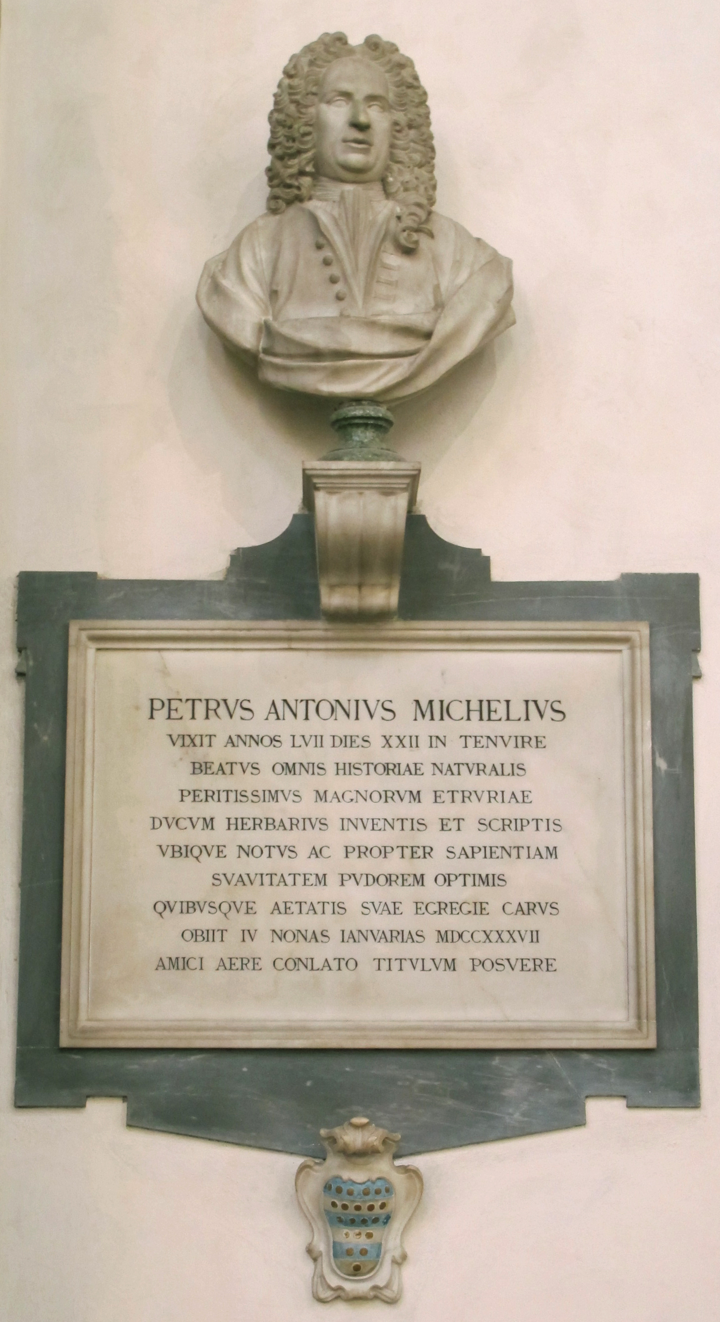 S. croce, tomba pier antonio micheli